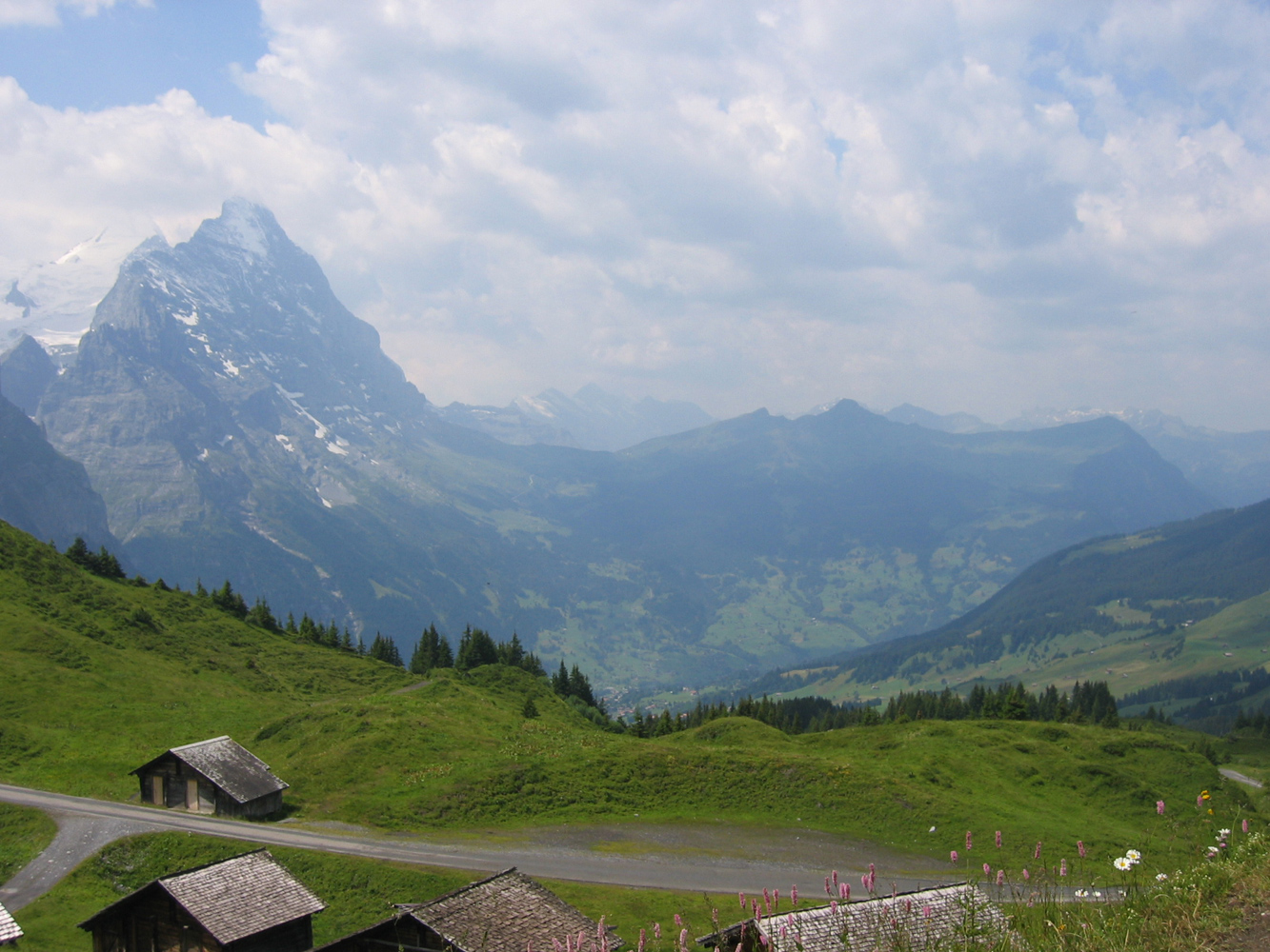 Blick von der Grossen Scheidegg nach Südwesten aufs Grindelwald-Tal mit Eiger, Kleinen Scheidegg und Männlichen.